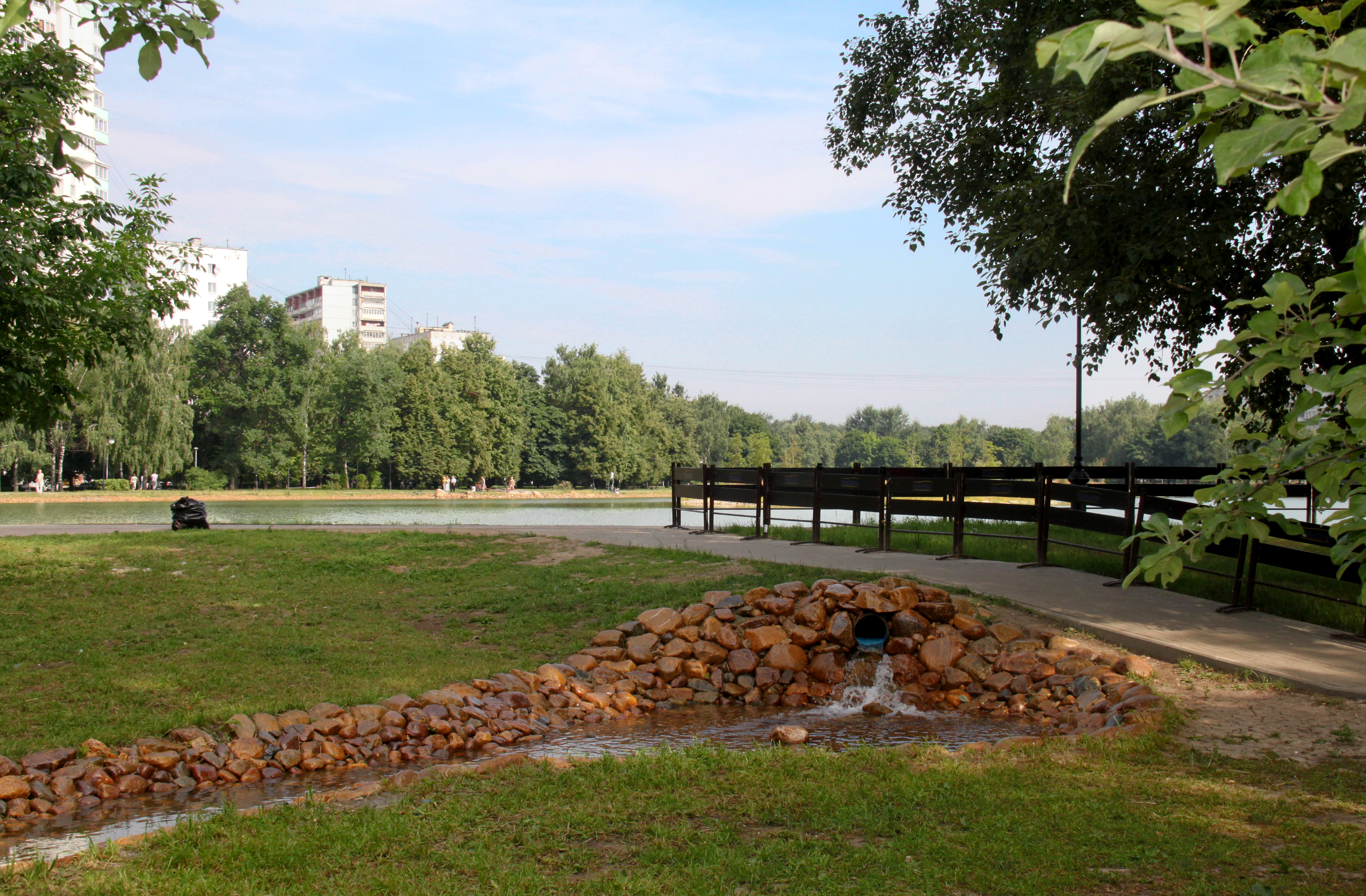 Ручей, протекающий от Ангарских прудов к Дмитровскому парку